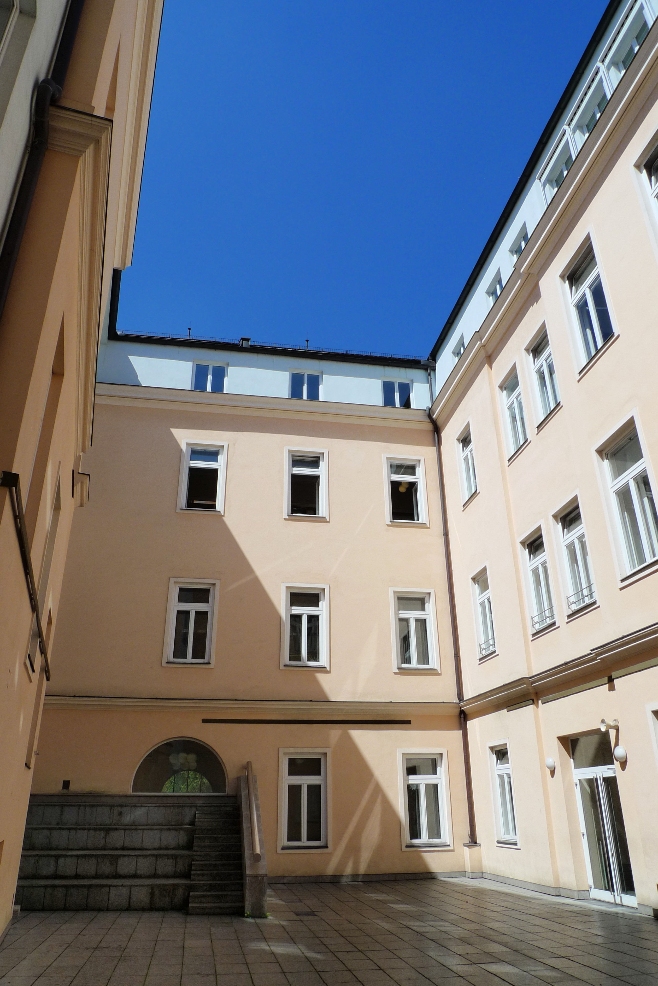 Akademisches Gymnasium Graz, Innenhof; eigene Aufnahme des Autors